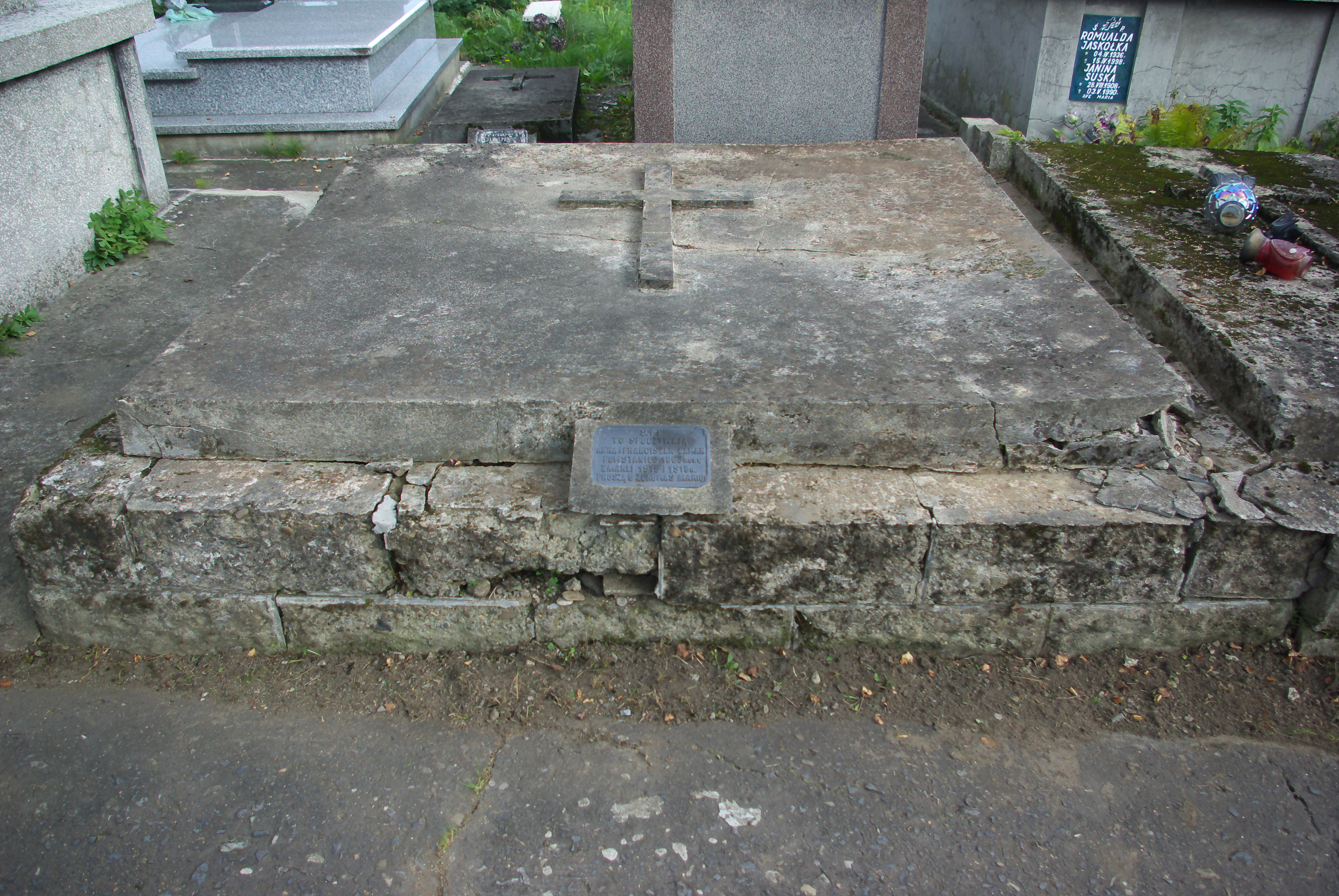 Grobowiec Anny i Franciszka Baranów na Cmentarzu Centralnym w Sanoku.